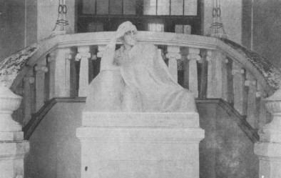 II Gimnazjum im. Juliusza Słowackiego w Tarnopolu przy ul. Konarskiego 2 (dawniej św. Jana) na skrzyżowaniu z ul. Słowackiego.